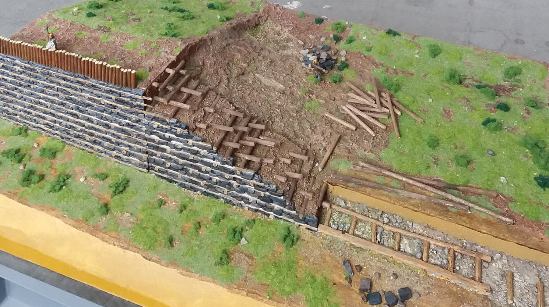 Maquette de Nicolas Hirsch exposée au Service Archéologique de la Ville de Lyon : face avant vue de dessus.